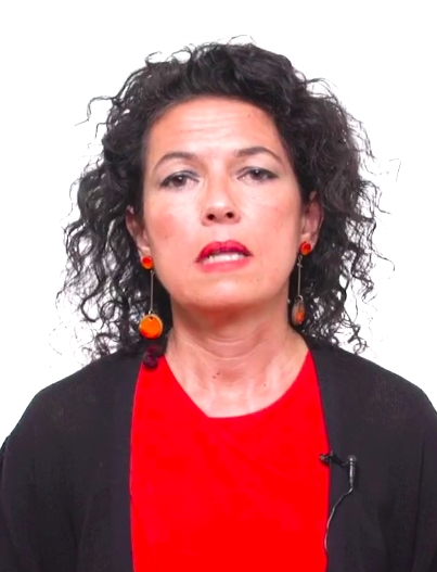 Maribel Mora